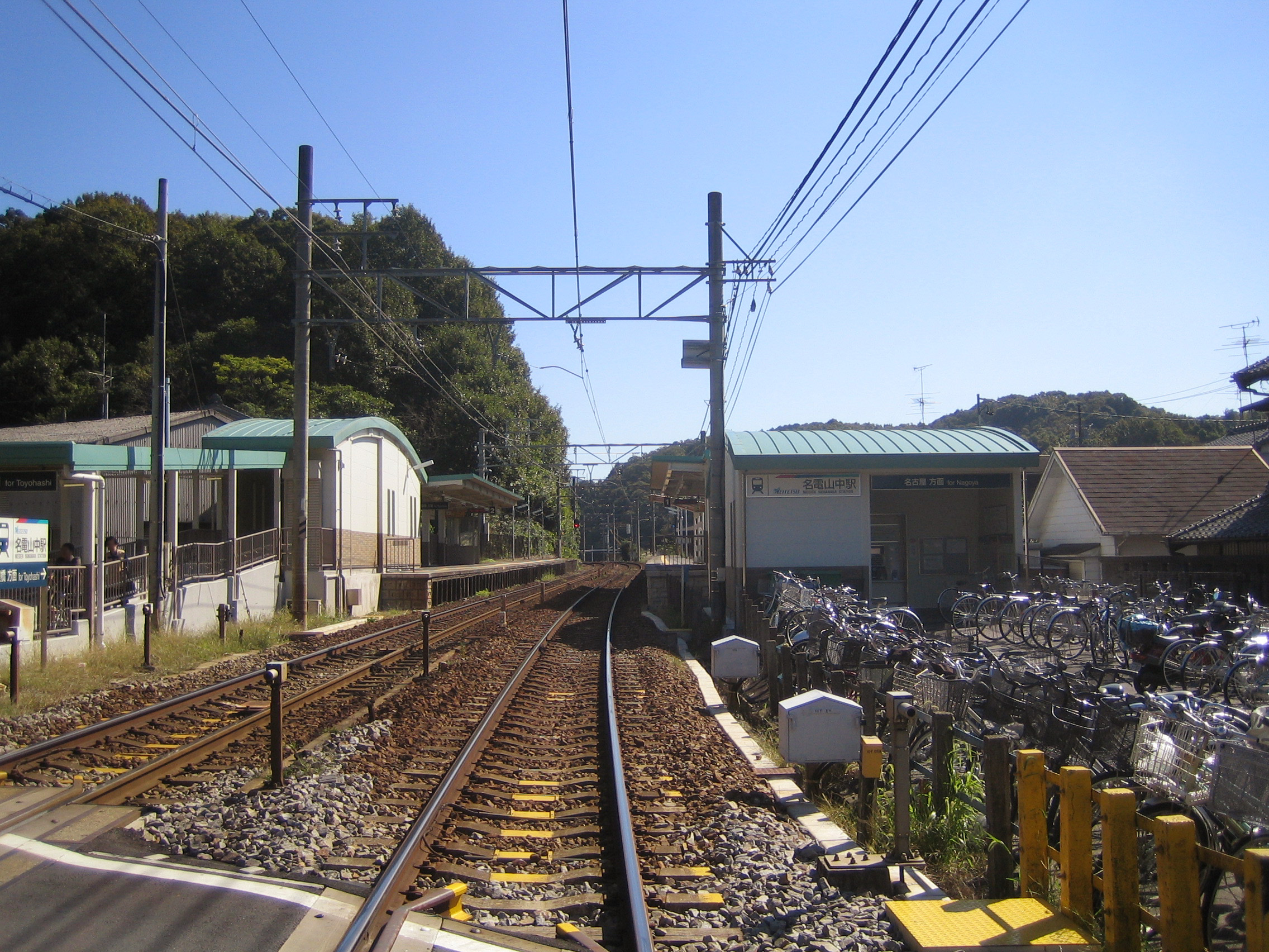 Meiden Yamanaka Sta. (名電山中駅), in Okazaki, Aichi, Japan